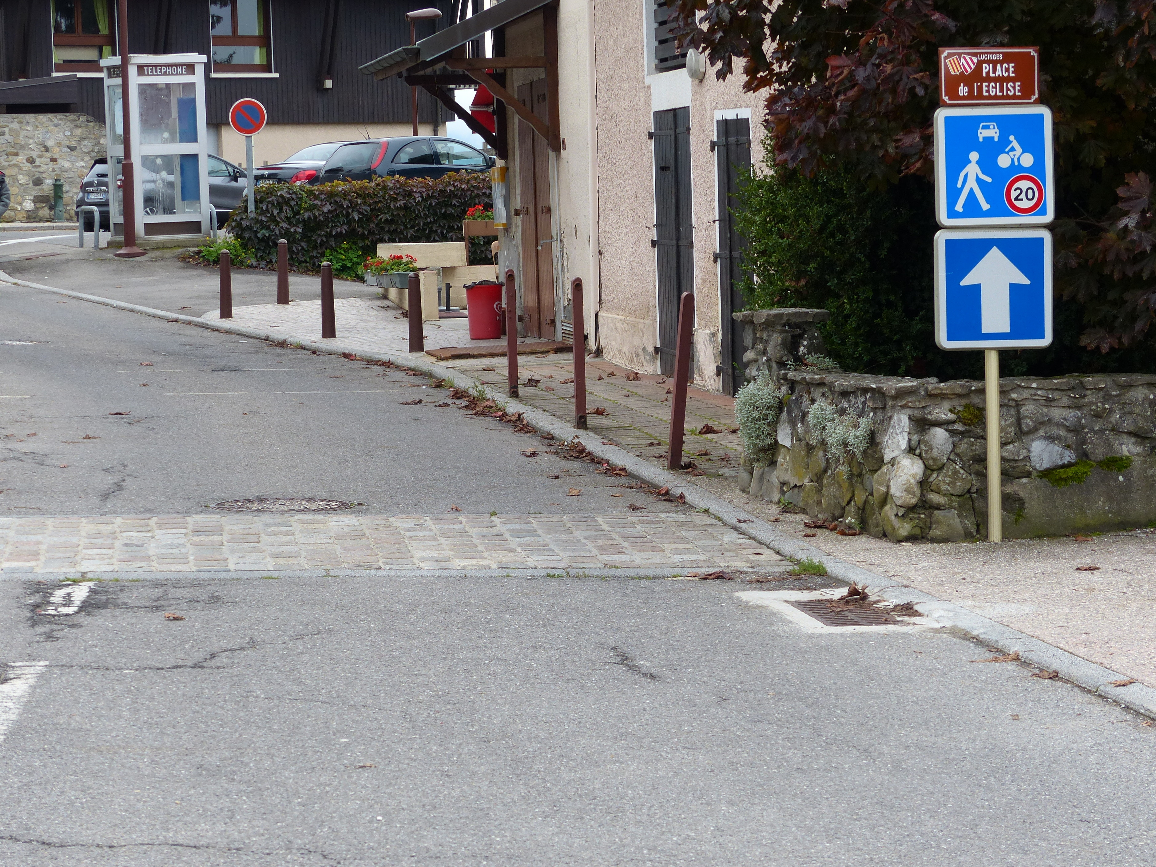 Panneaux routiers français B52 et C12.